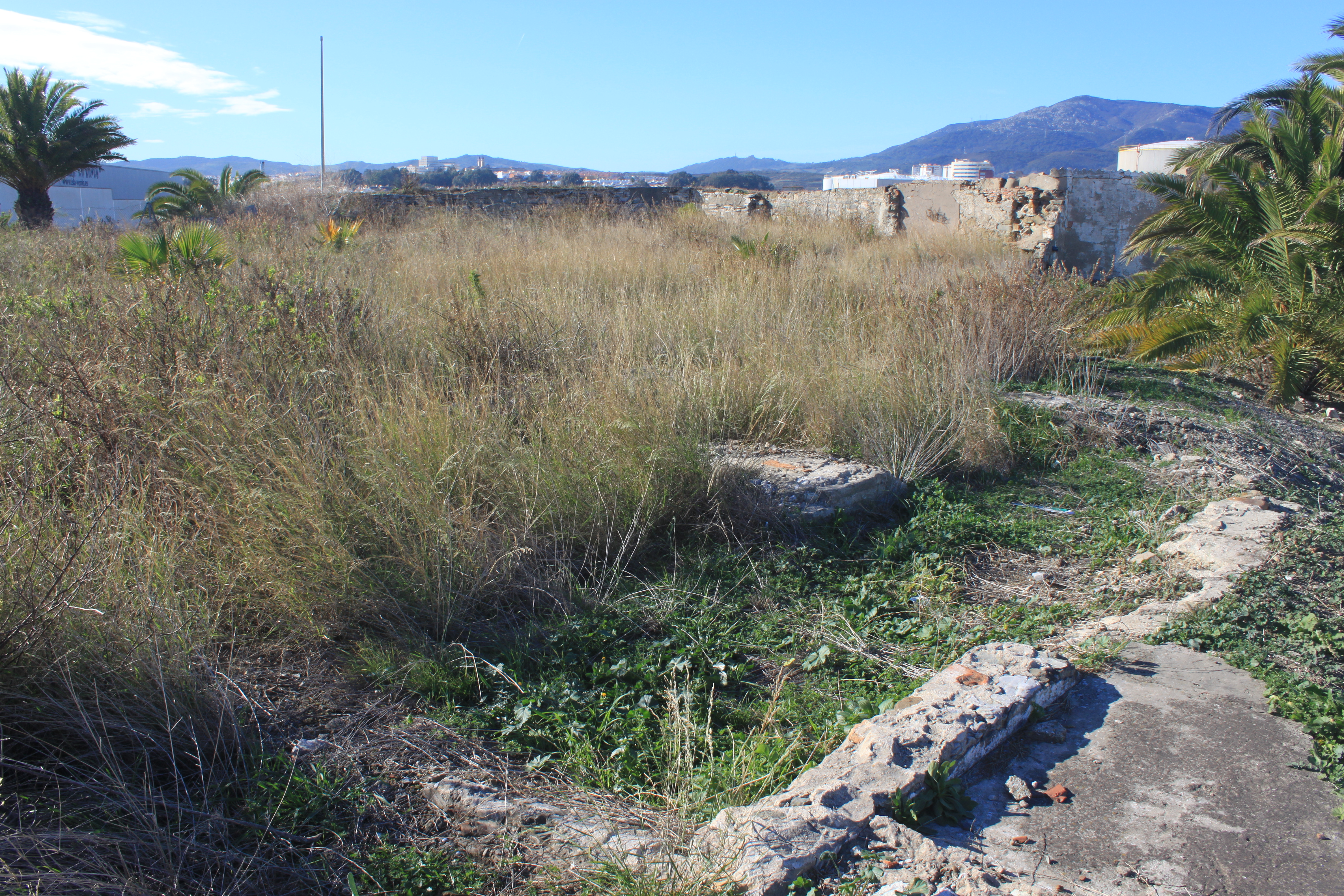 Restos del Fuerte de Isla Verde, en el interior de las instalaciones del Puerto de Algeciras. Algeciras, Andalucía, España.